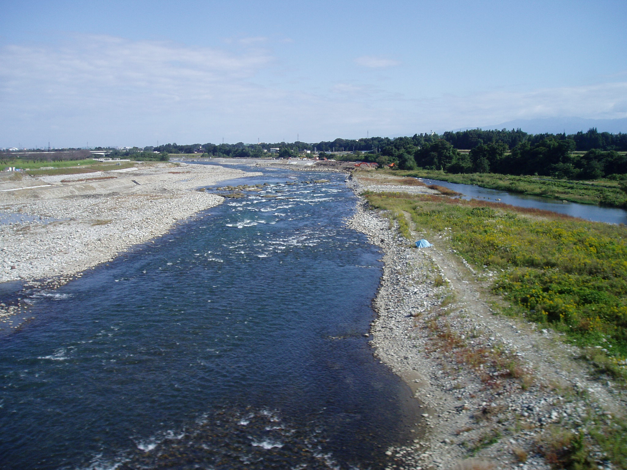 高山本線の鉄橋から撮影した神通川